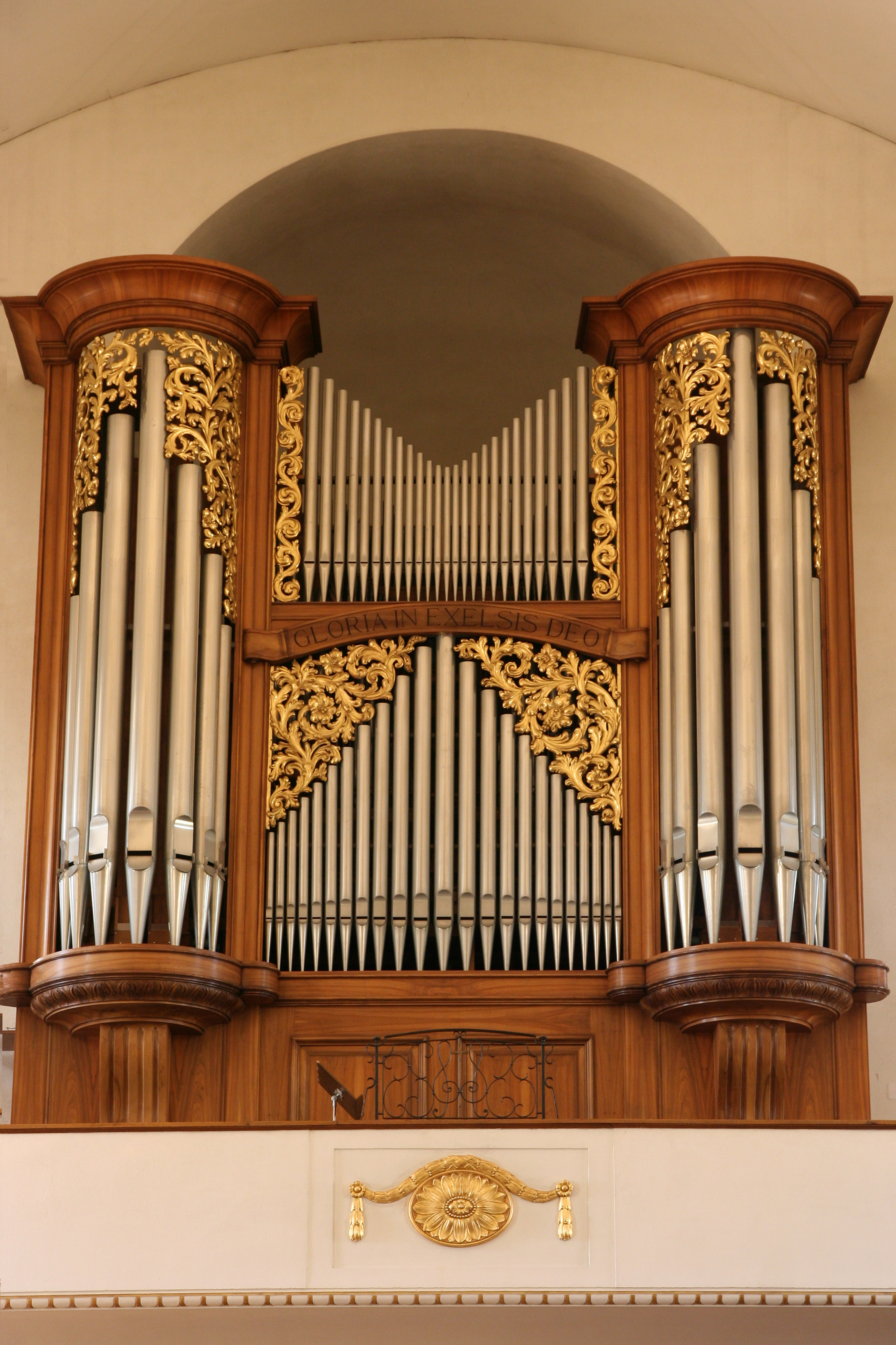 Römisch-katholische Pfarrkirche St. Agatha Dietikon, Orgel